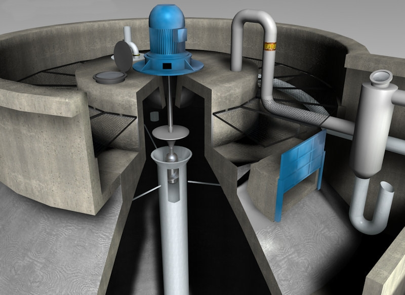 Faulbehälter Gasdom im Schnitt mit den wichtigsten Einbauten